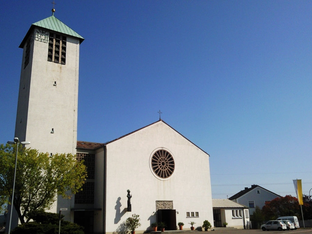 Stadtpfarrkirche St. Barbara, Maxhütte